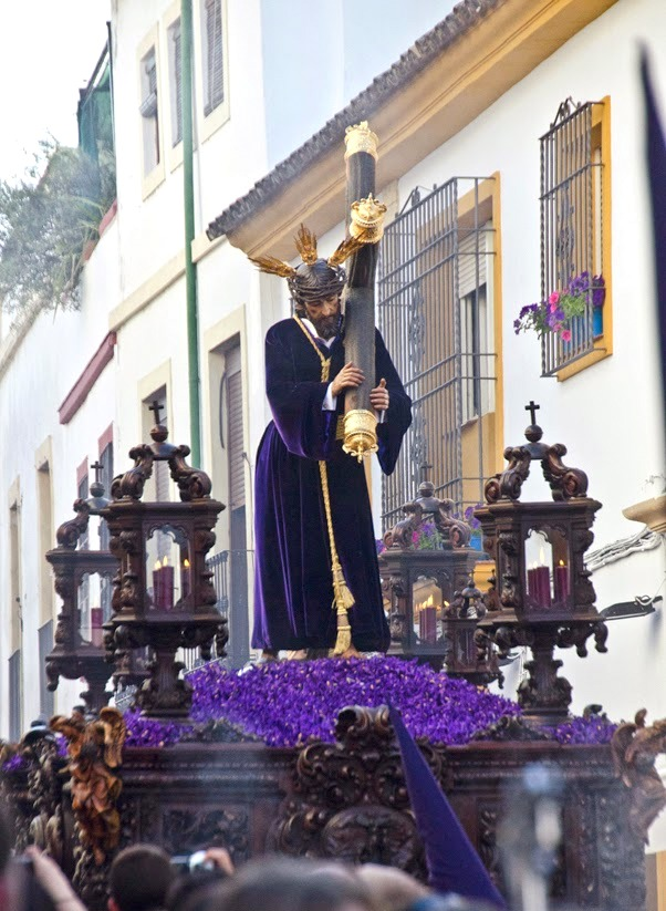 Nuestro Padre Jesús de Pasión